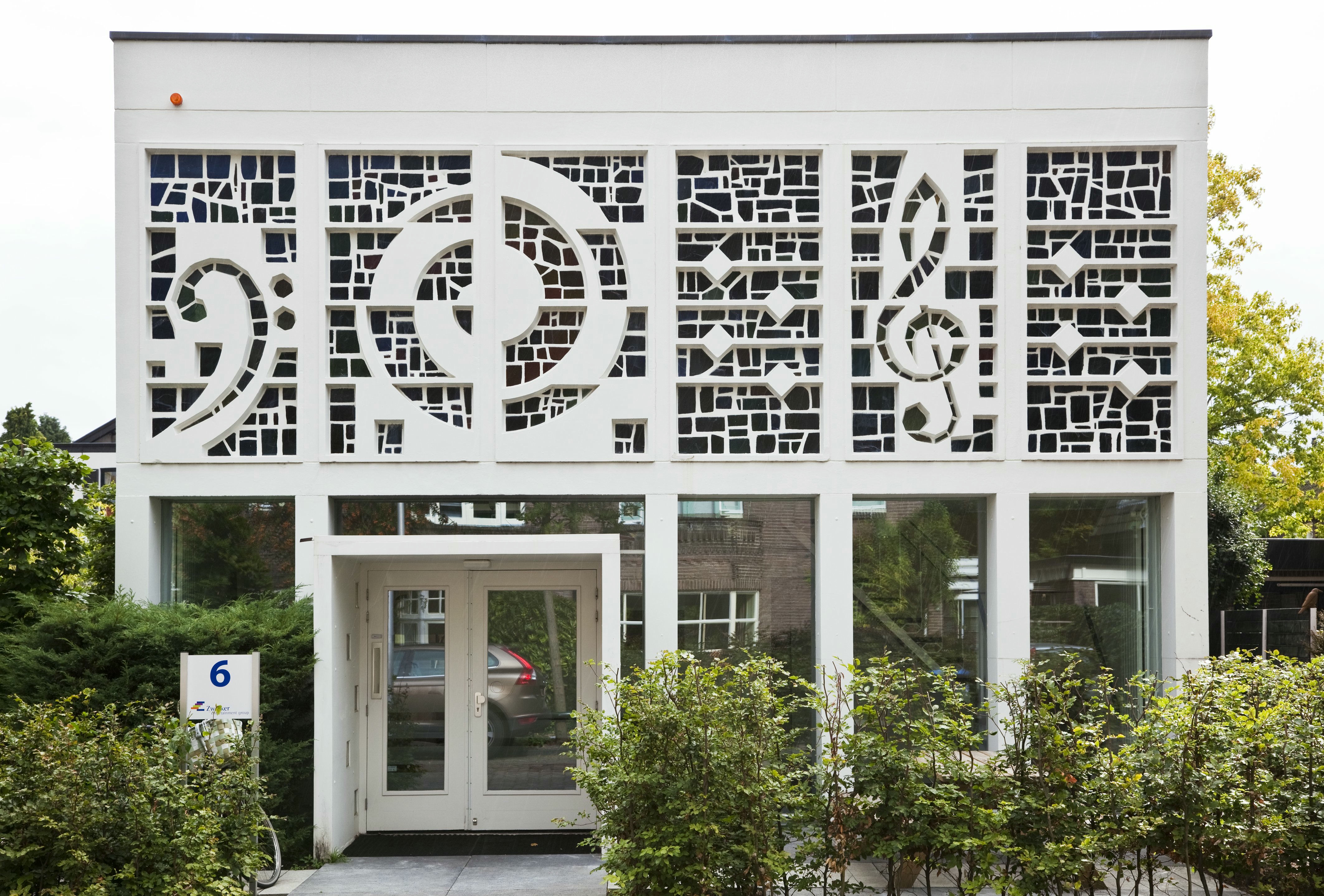 Voormalig kantoor Bovema Platenmaatschappij: Overzicht van de voorgevel